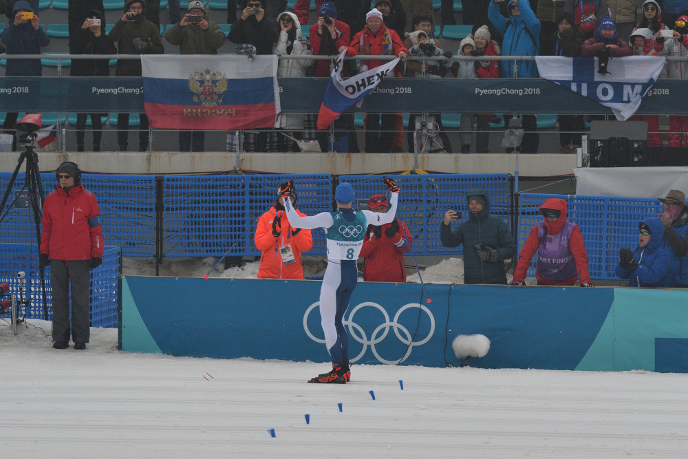 Iivo Niskanen wins gold in PyeongChang